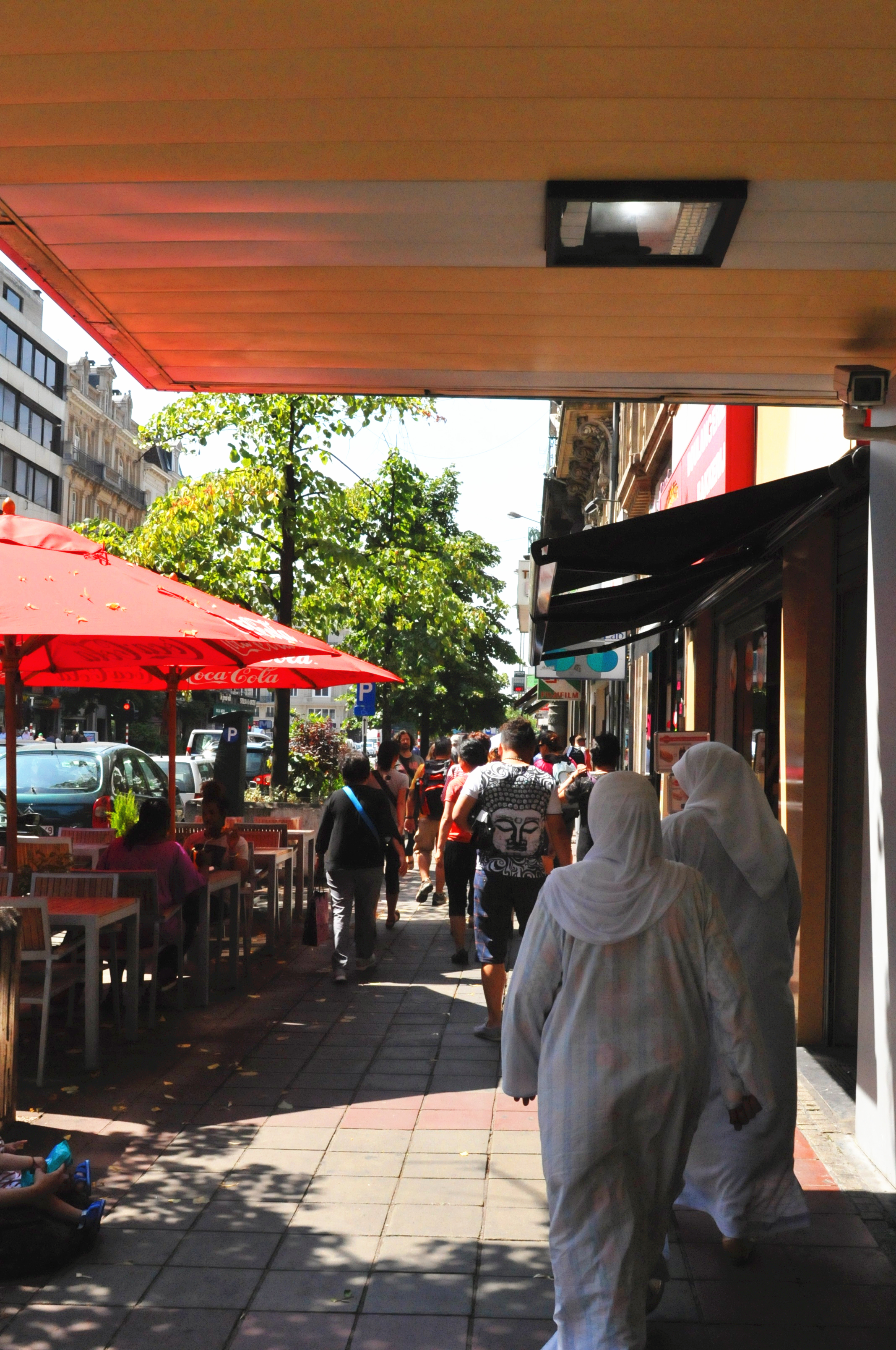 Dansaert, 1000 Brussel, Belgium